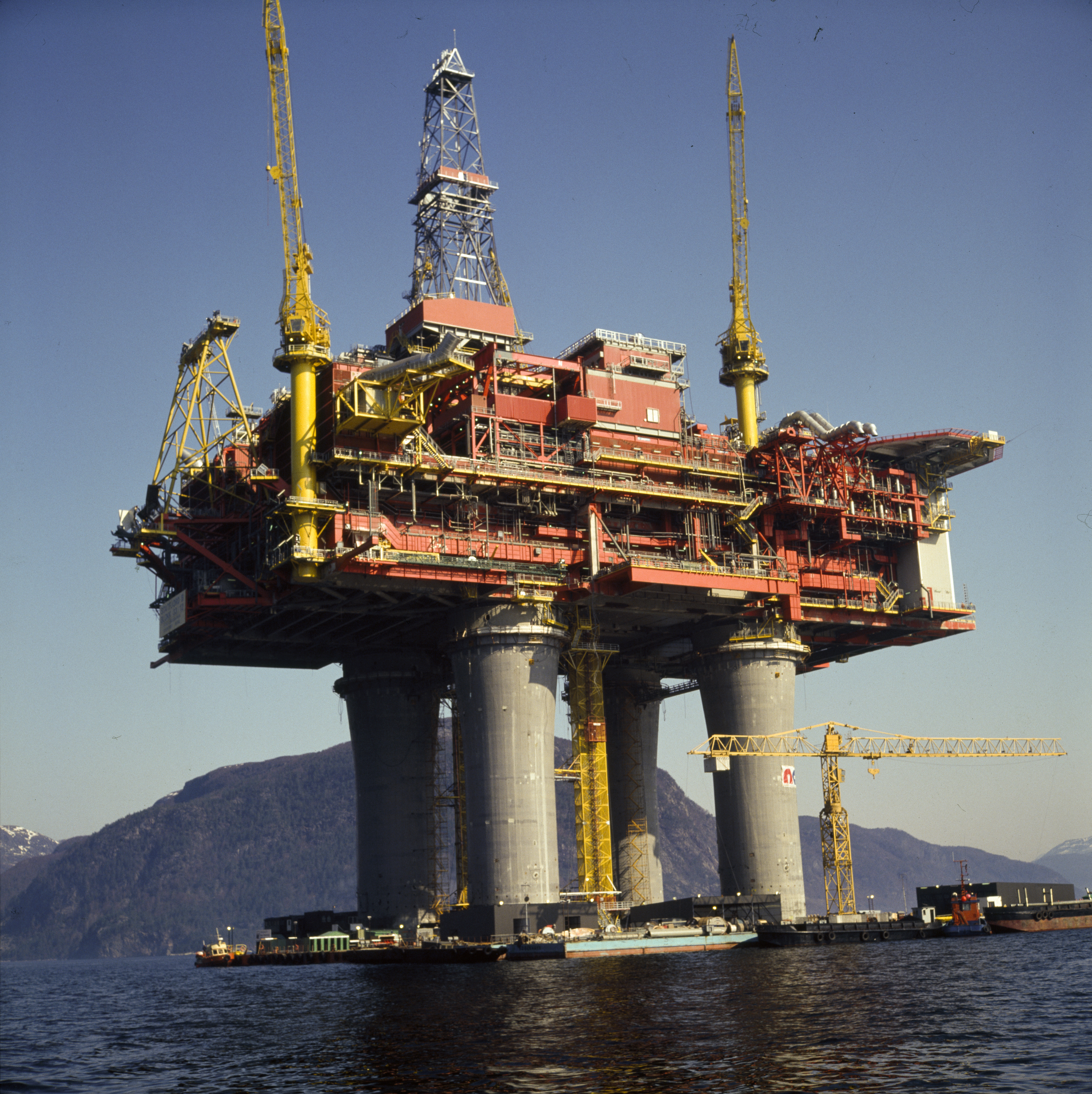 Statfjord B i Yrkjefjorden - Vats